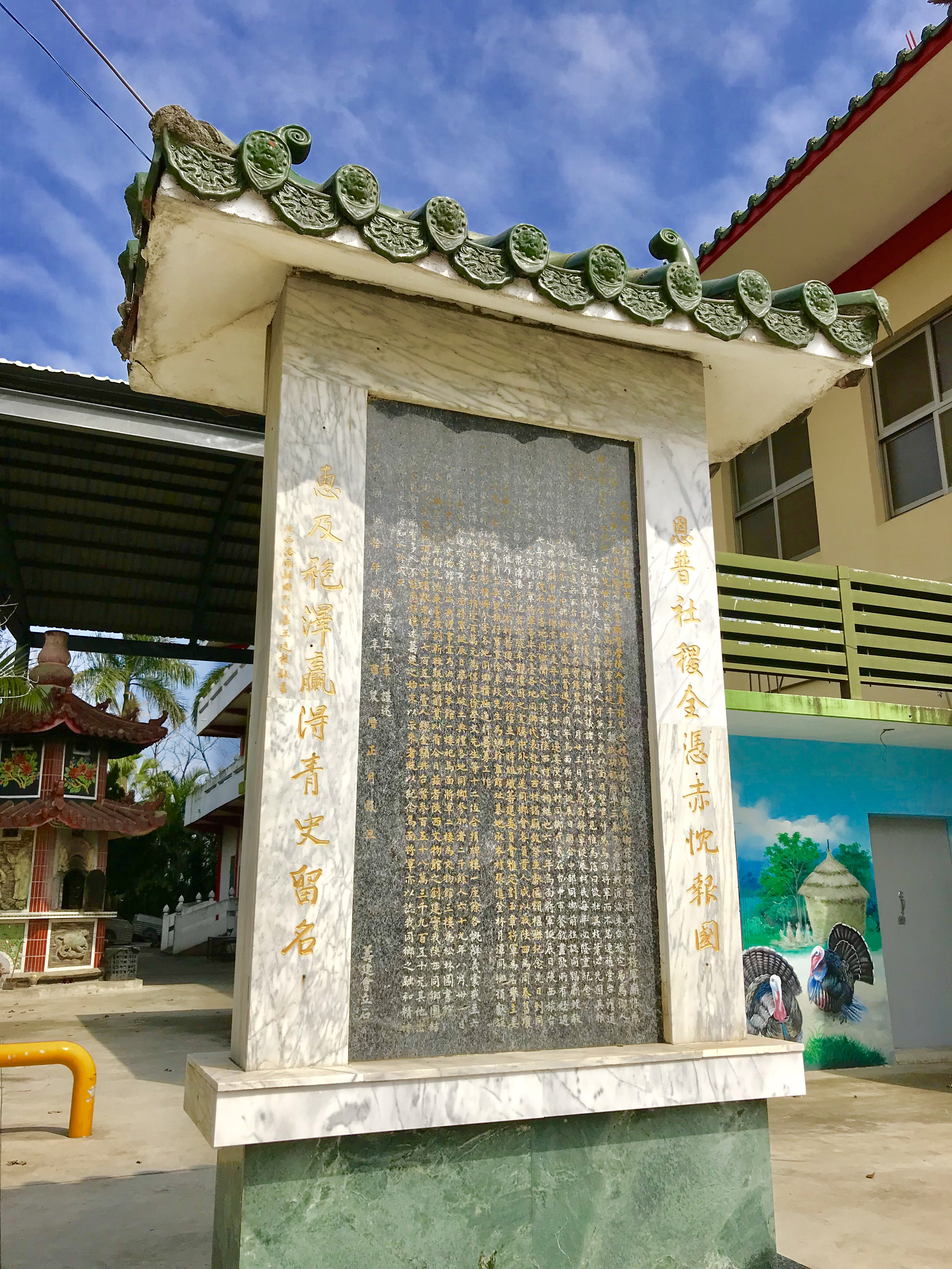 王孔章醫生所贈的陝西文物館紀念碑。